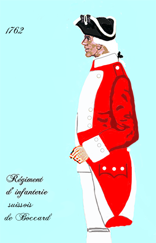 Uniform eines königlich französischen Infanterie-Regiments nach dem Choisel-Erlaß von 1762. - Entnommen und überarbeitet aus: „LES UNIFORMES ET LES DRAPEAUX DE L'ARMÉE DU ROI“ Marseille 1899.